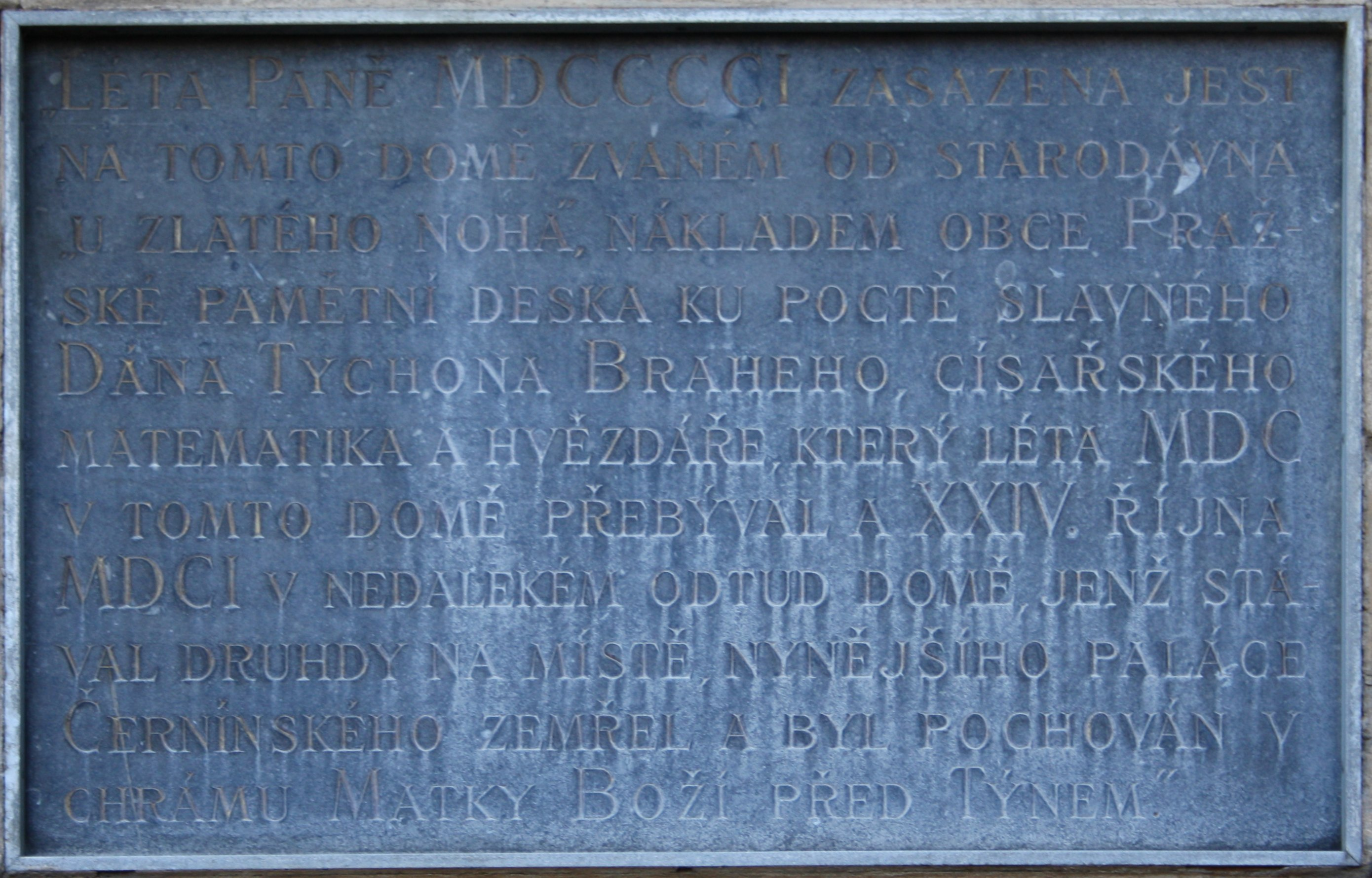 Nový svět; Tycho Brahe